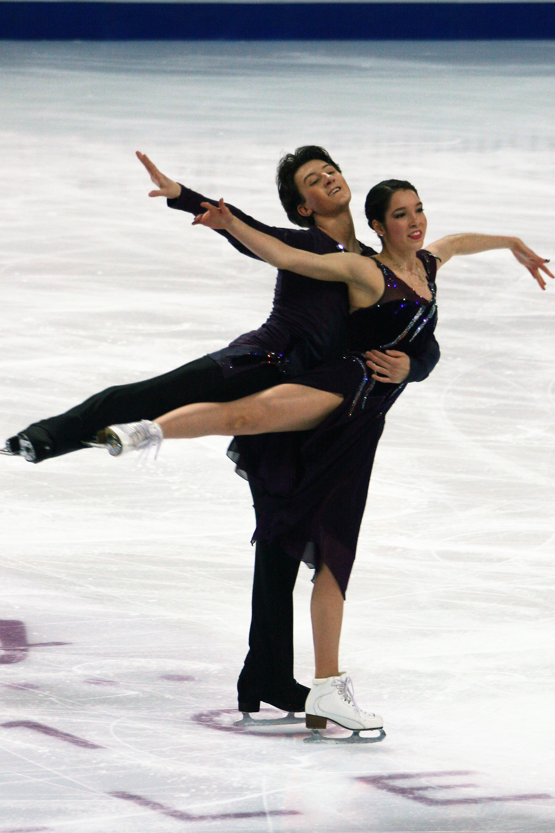 Лоррейн Макнамара / Квинн Карпентер (США) на финале Гран-при по фигурному катанию среди юниоров 2016-2017